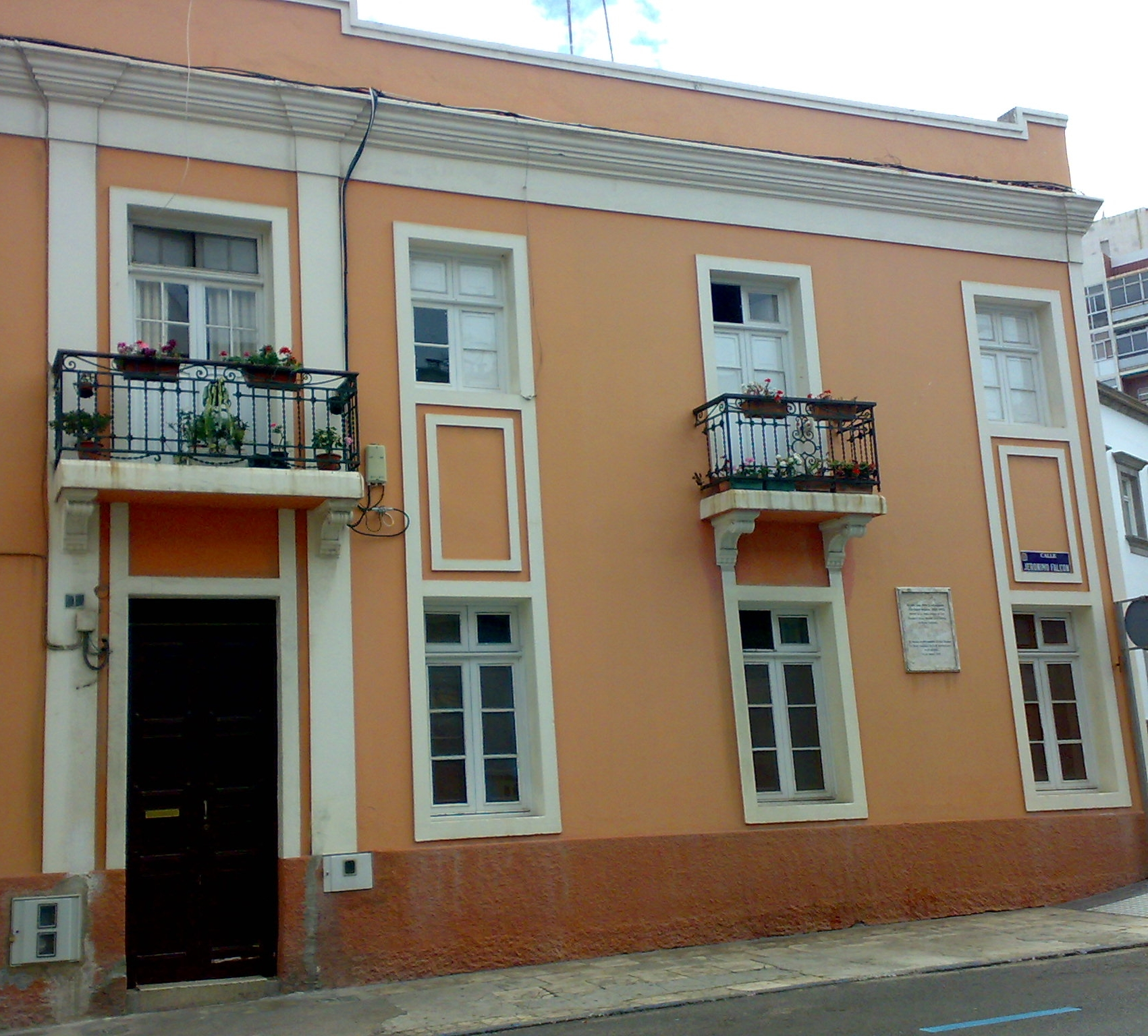 Casa donde vivió el ilustre acuarelista grancanario José Comas Quesada y que se encuentra situada en la calle Jerónimo Falcón nº 1 de Las Palmas de Gran Canaria.